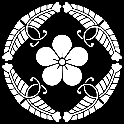 「梅八つ藤」紋（染抜）